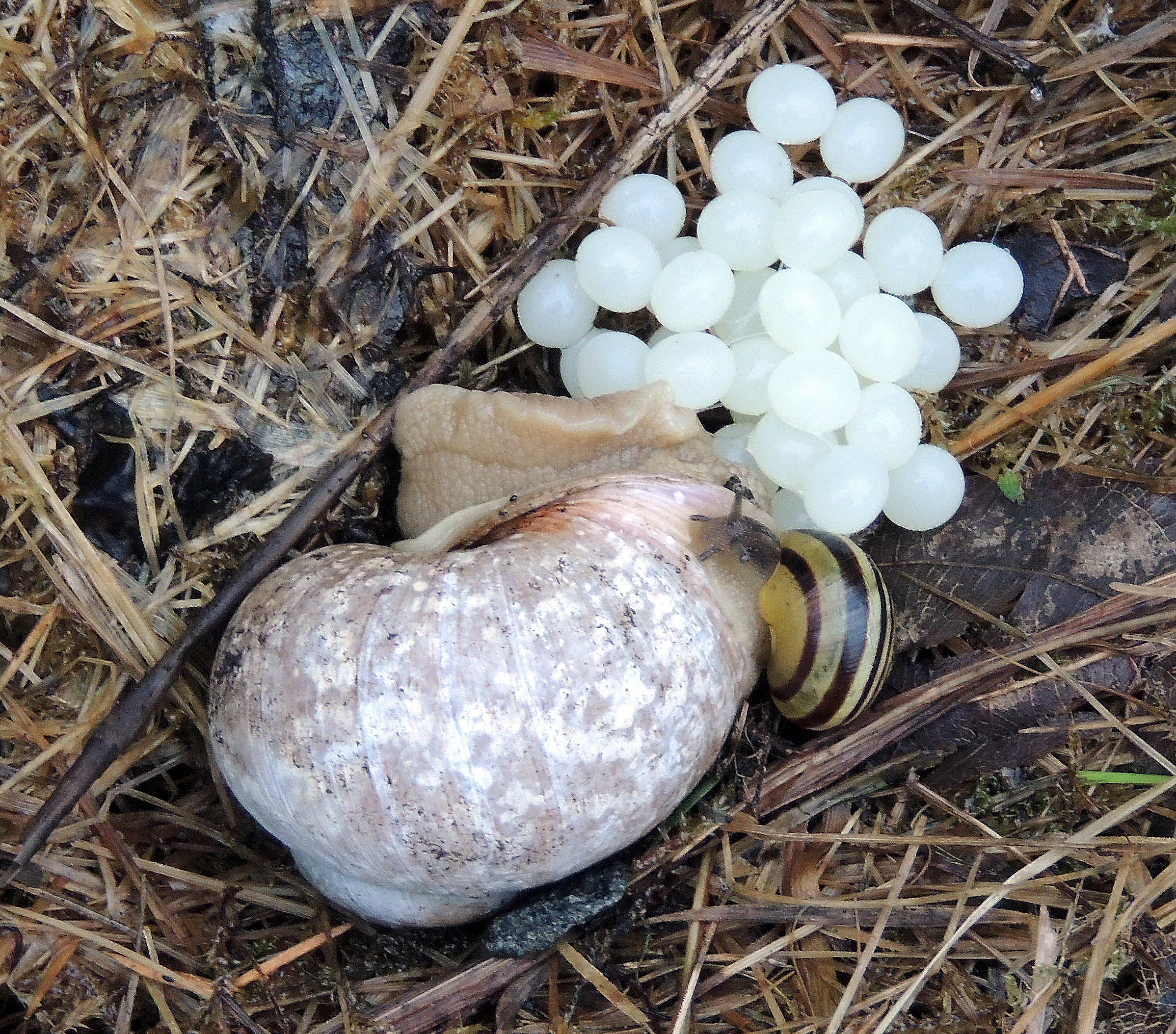 Vinbergssnäckan lägger ägg i komposten